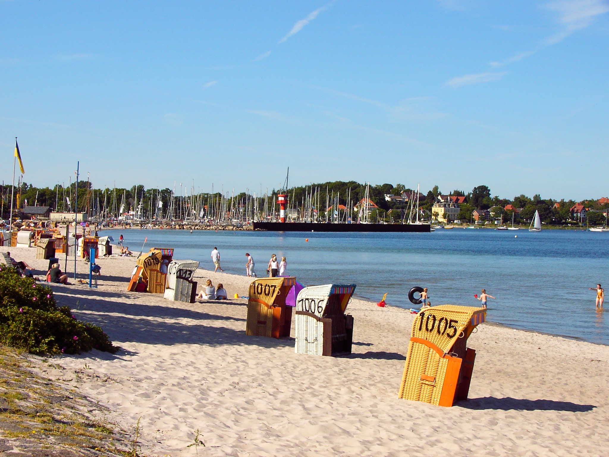 Eckernförde: Beach near the port